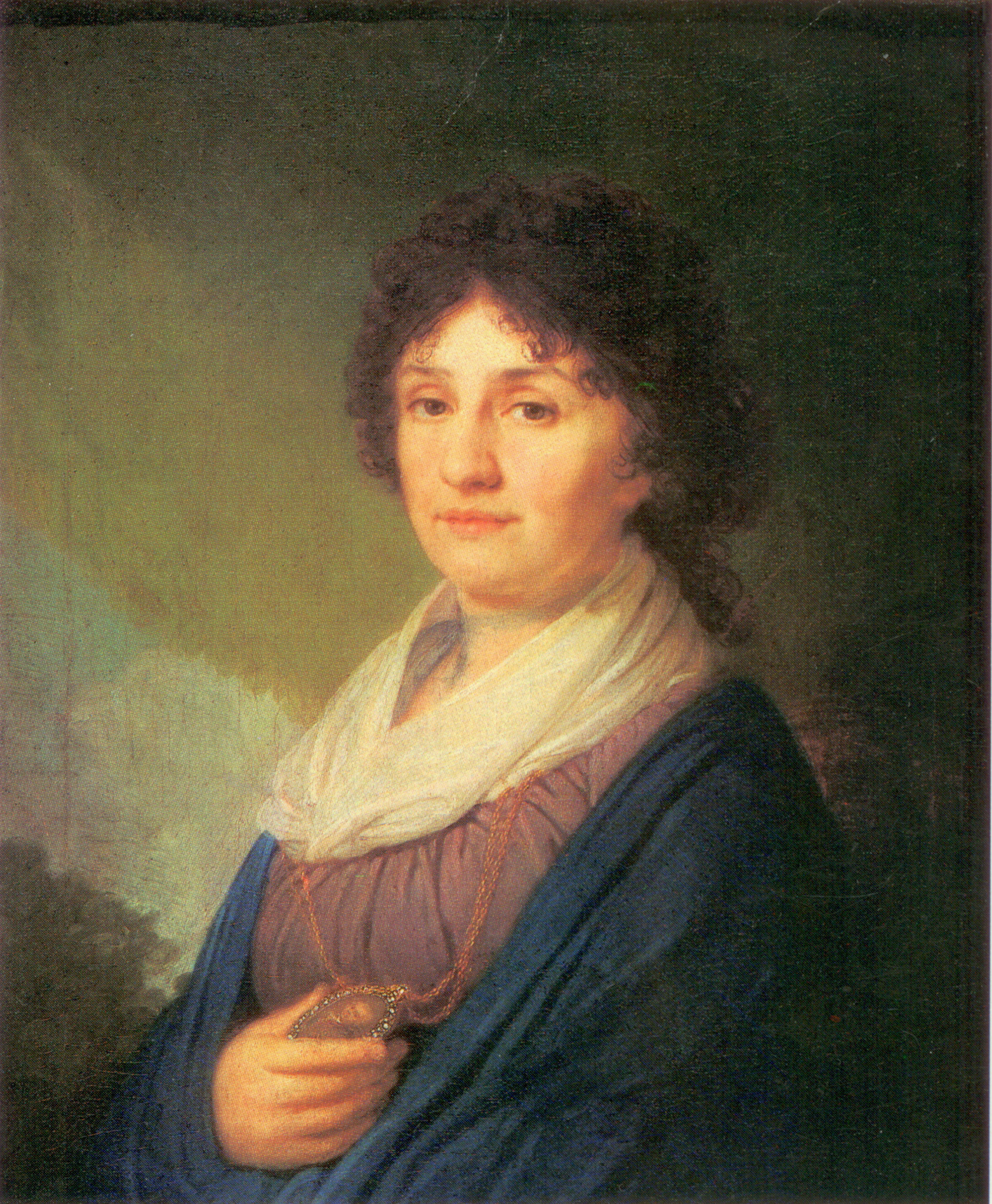 Екатерина Николаевна Давыдова, ур. Самойлова, в 1 браке Раевская (1750-1825)